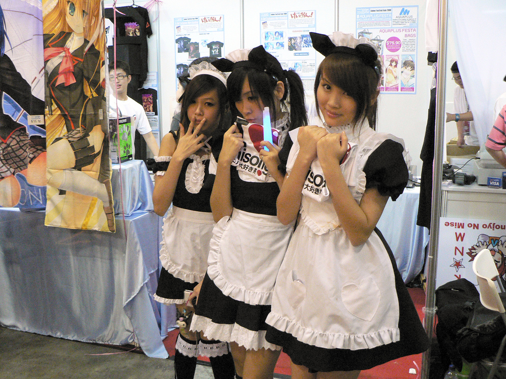 Anime Festival Asia 2009 : 22 Nov 2009